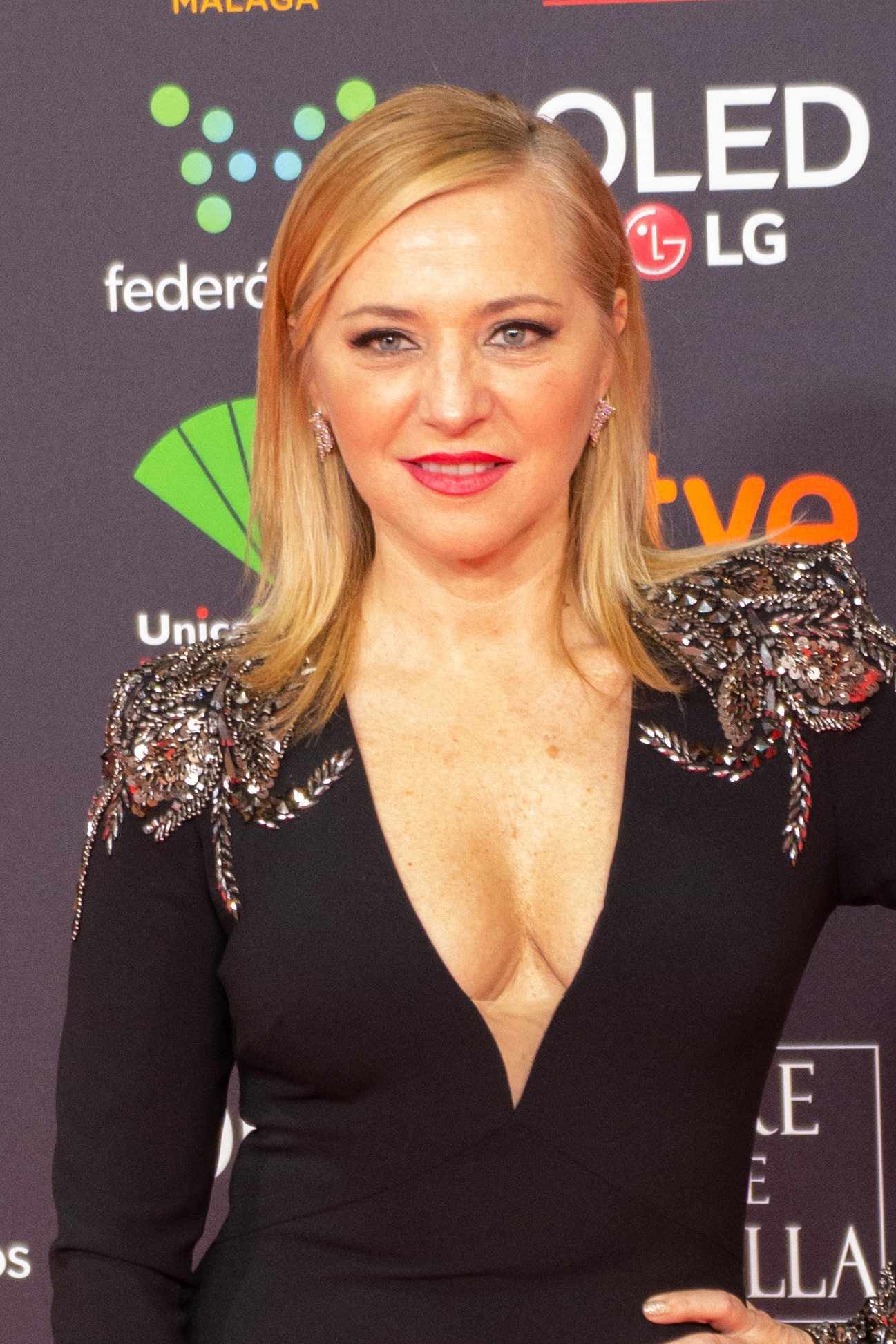 Pilar Castro en la alfombra roja de la ceremonia de entrega de los Premios Goya 2020, celebrados en Málaga